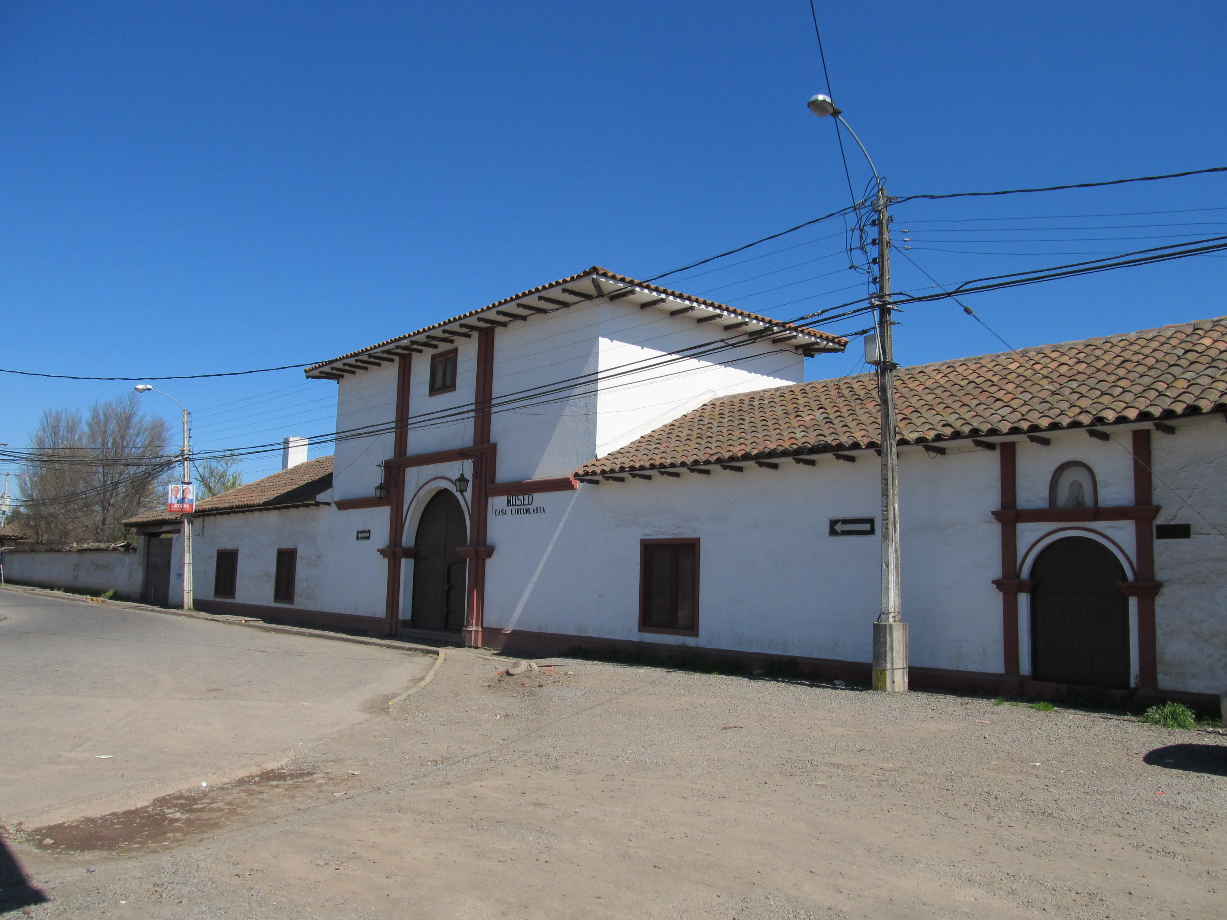 Casa patronal del fundo de Lircunlauta This is a photo of a national monument in Chile: 365